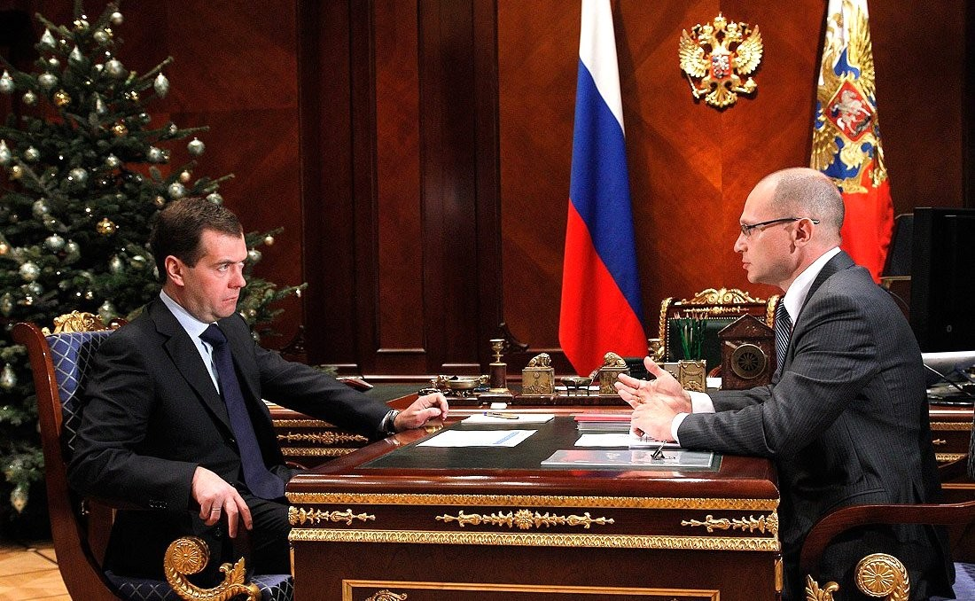 МОСКВА, КРЕМЛЬ. С.Кириенко рассказал Д.Медведеву о ходе выполнения программы по сооружению 28 новых атомных энергоблоков внутри страны, а также о зарубежных контрактах госкорпорации.